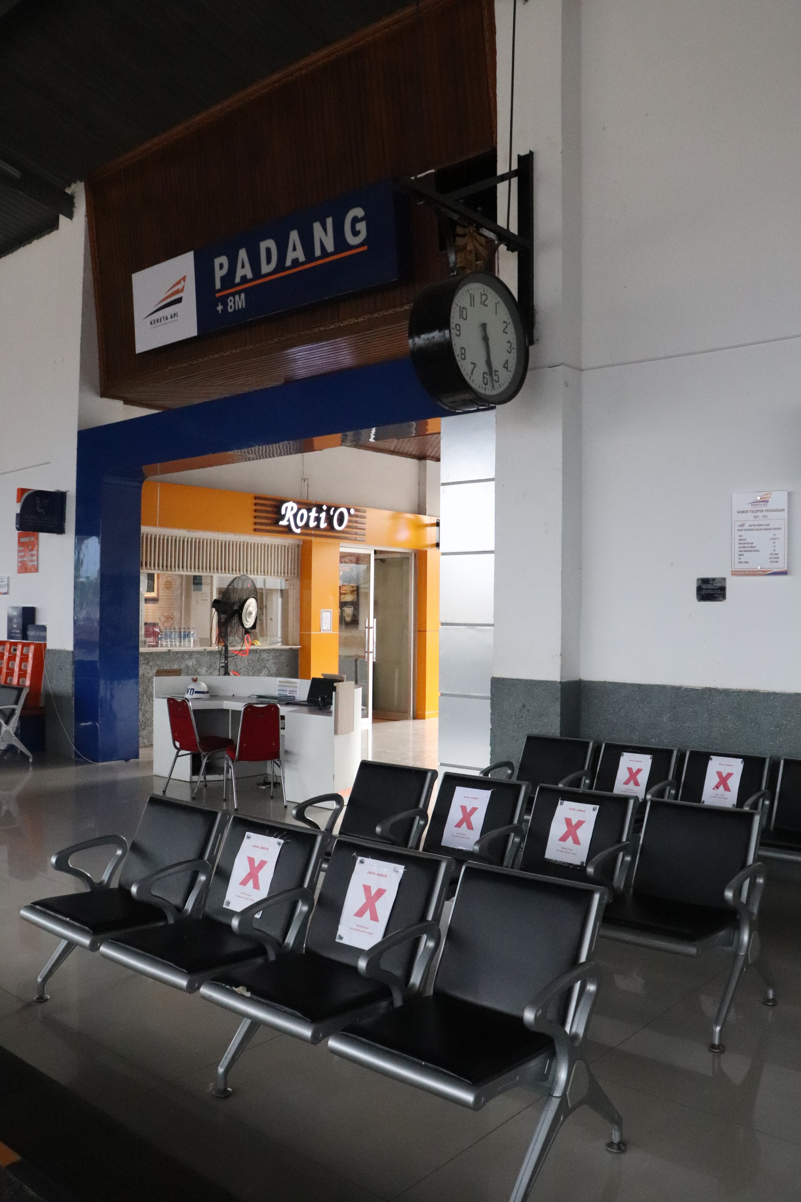 Stasiun Padang lengang difoto saat pandemi COVID-19 April 2020